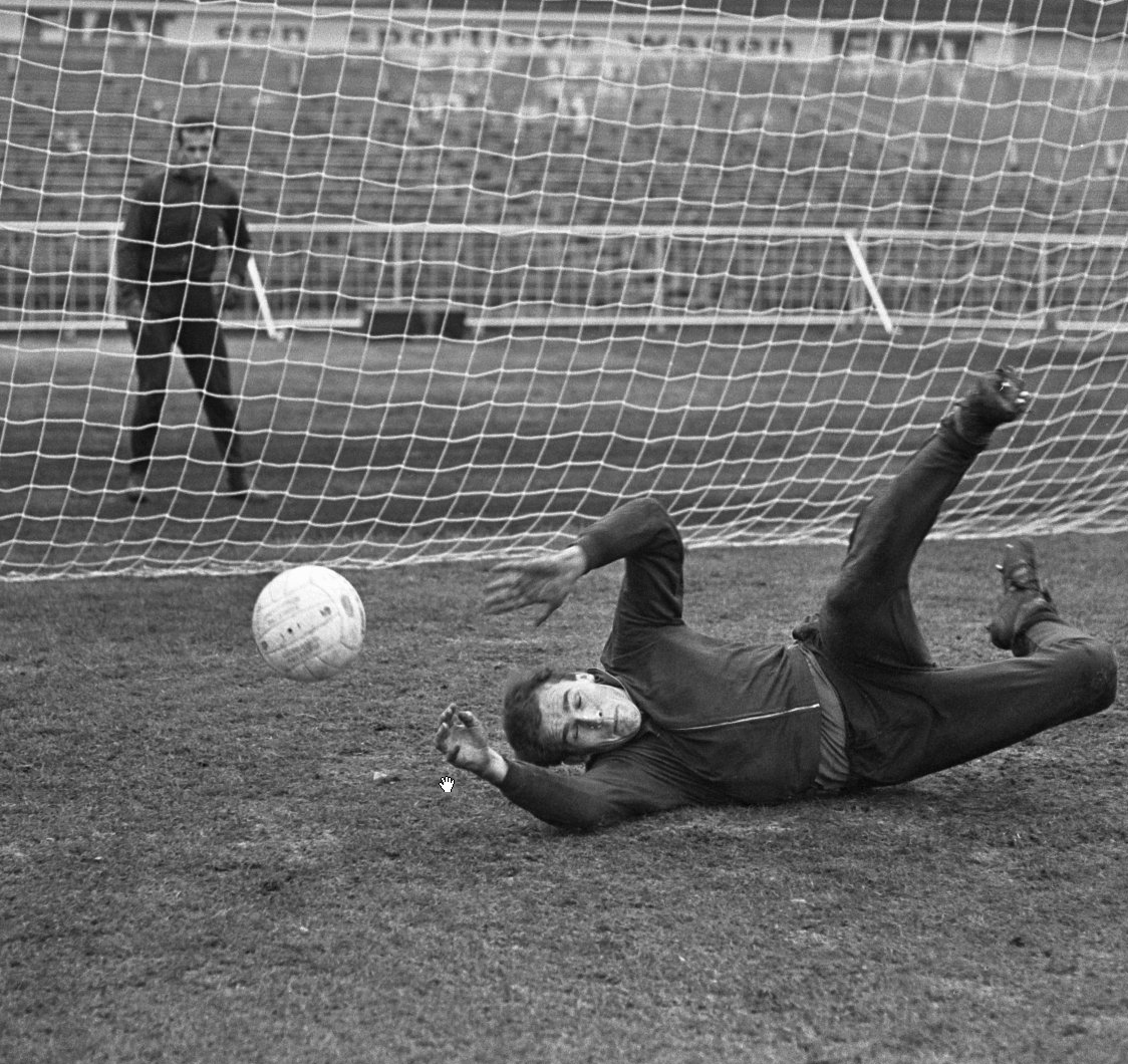 Ivo Viktor training with Czechoslovakia national football team in 1966.